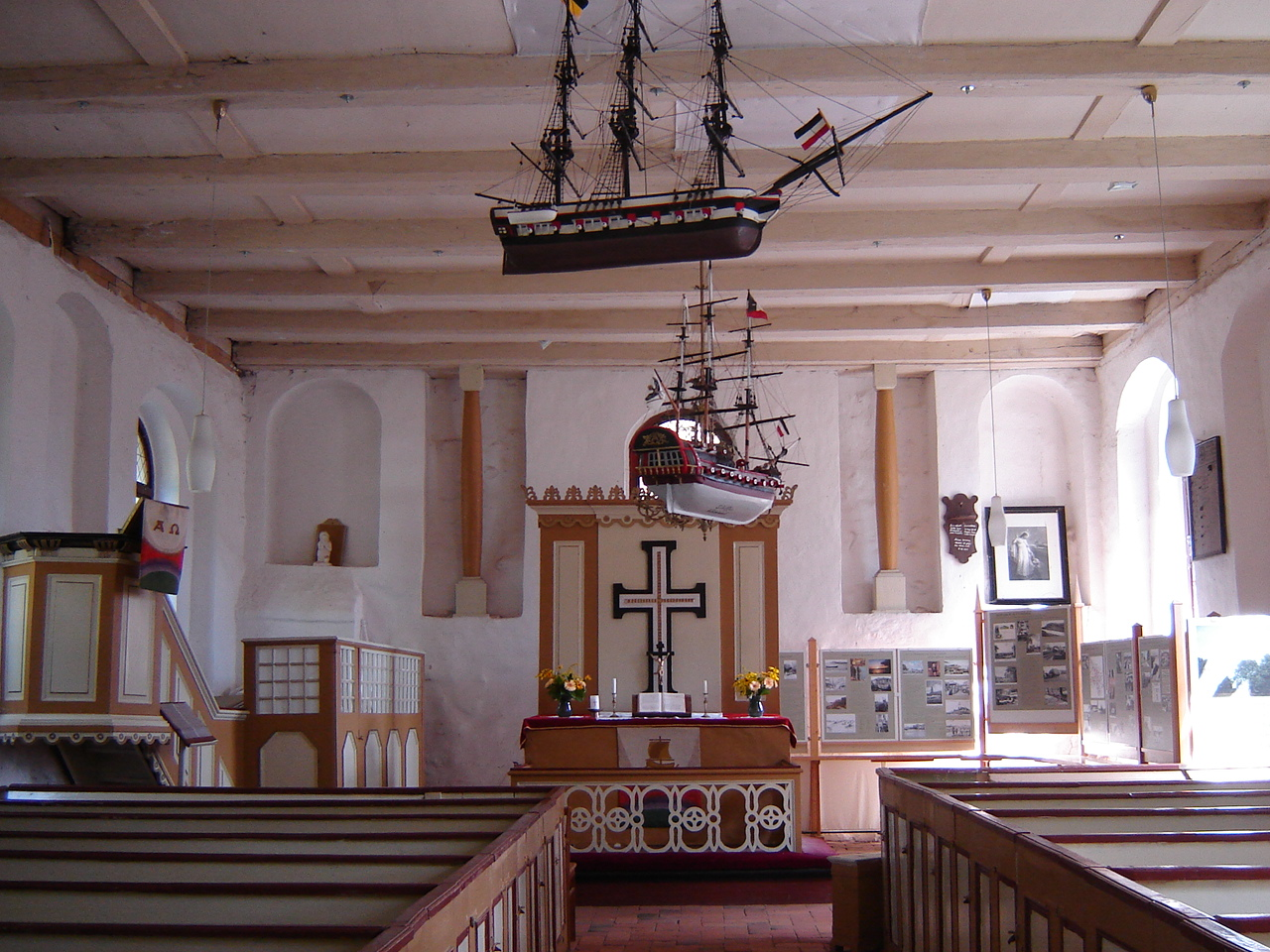 Wnętrze zabytkowego kościoła ewangelickiego w Garz.